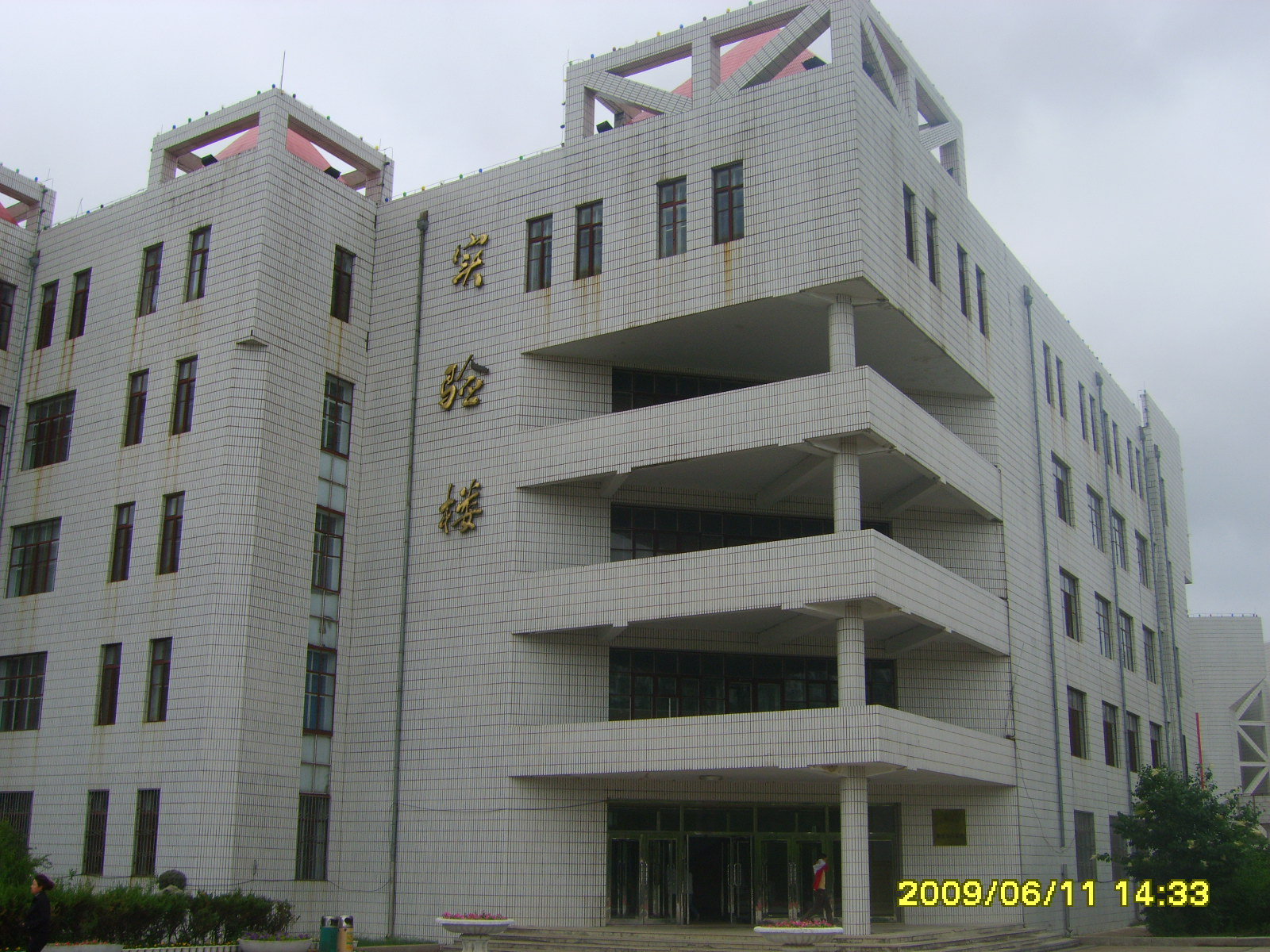 黑龙江省大庆市第一中学的实验楼